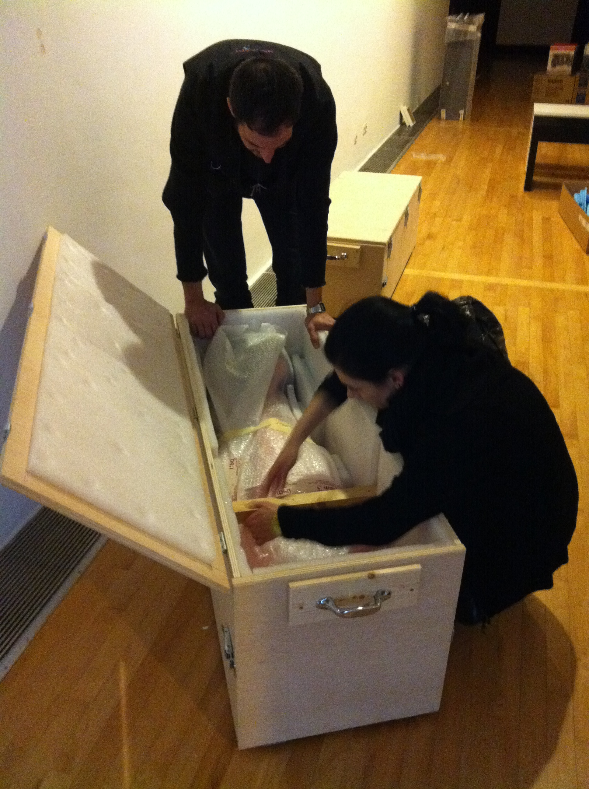 Desmuntatge d'una exposició temporal al Museu d'Art de Sabadell